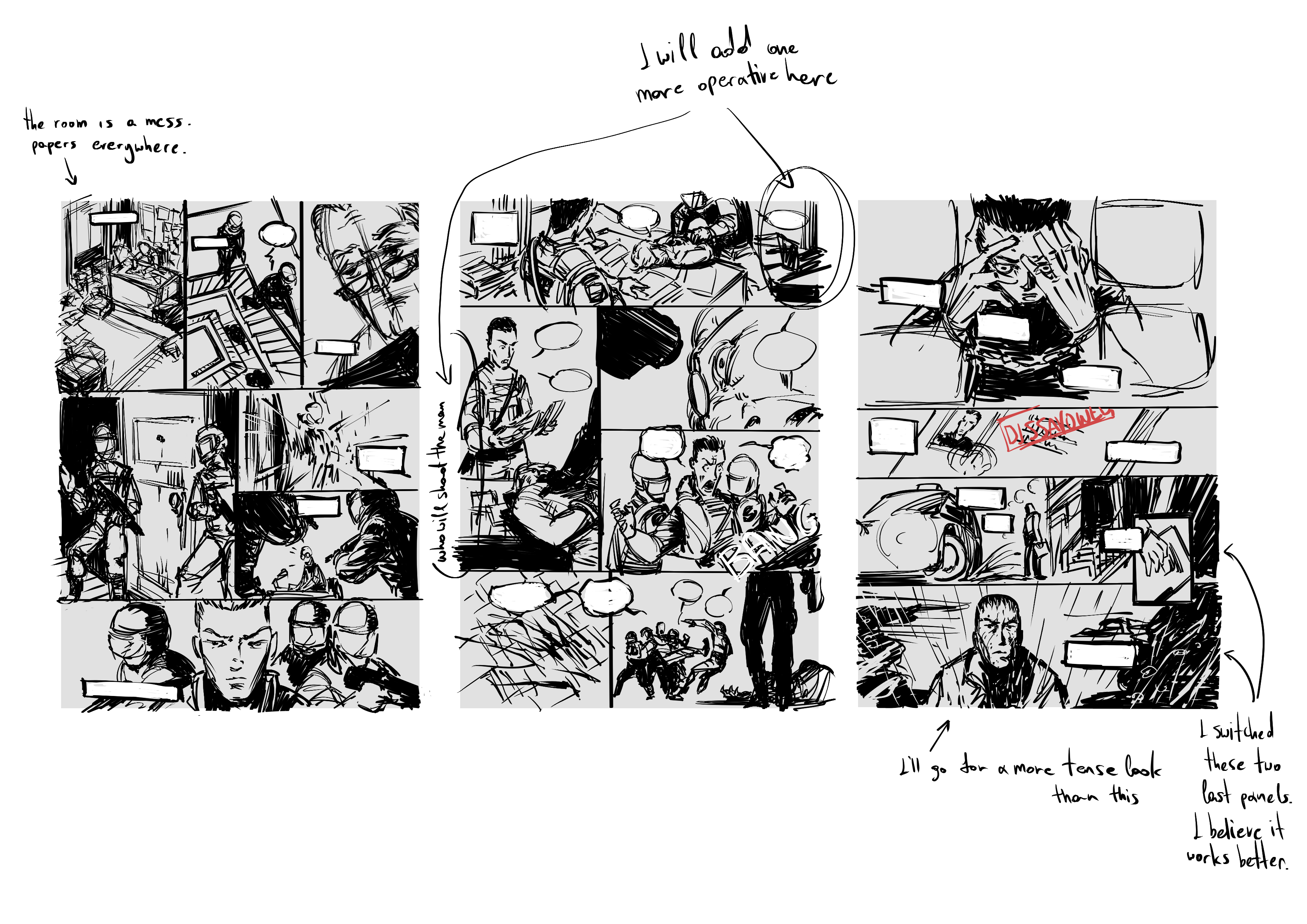 ZT spacial lay-outs